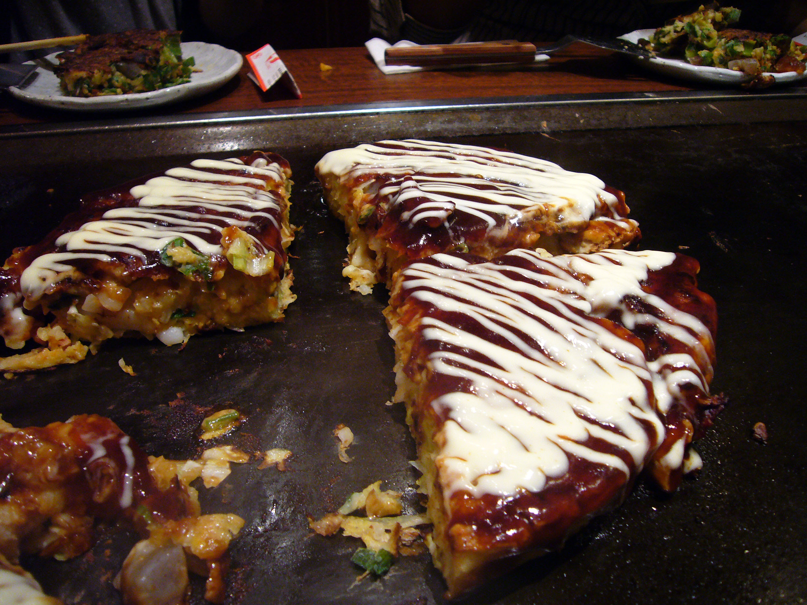 うまかった!